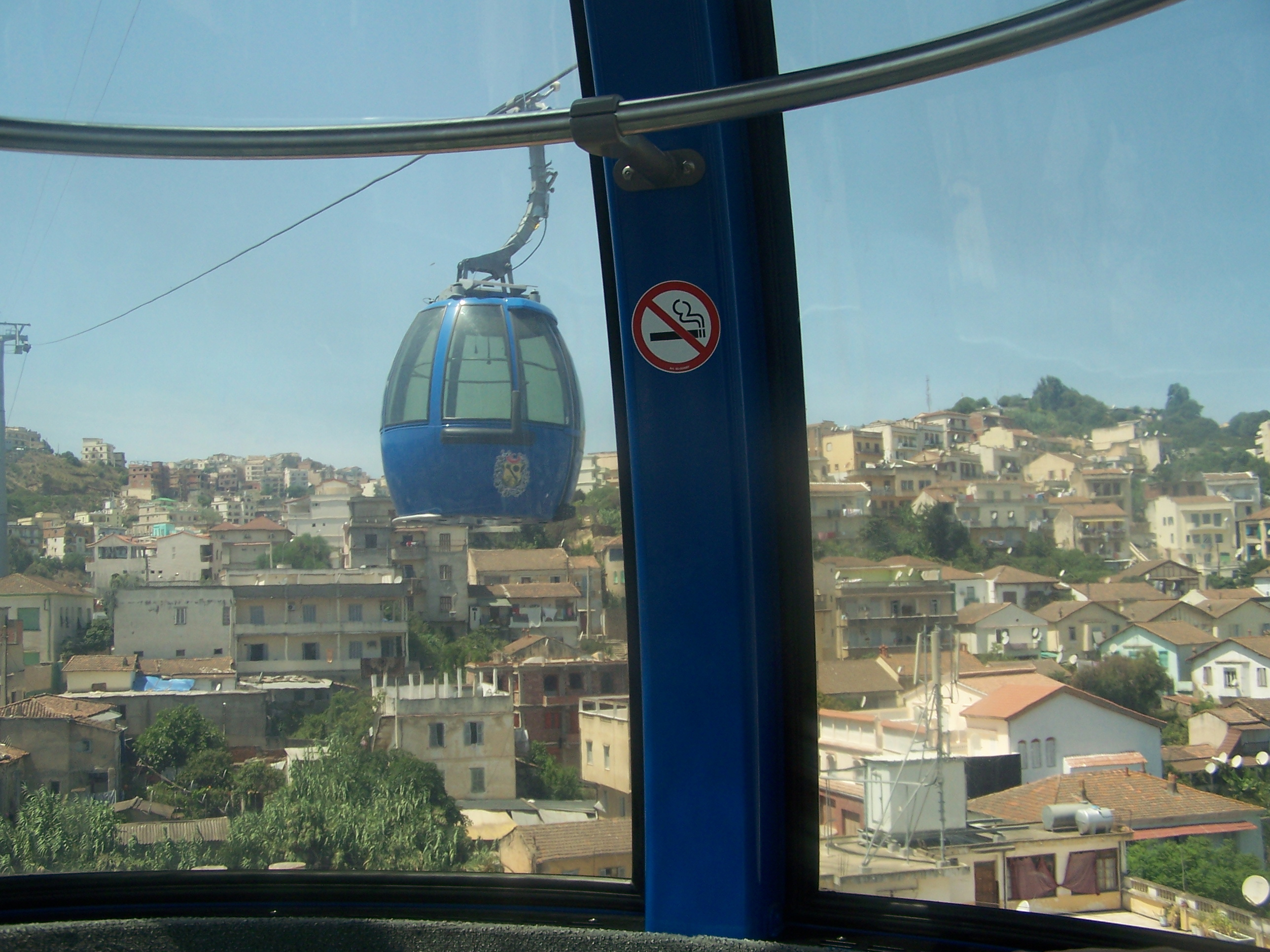 Télécabine de Skikda en Algérie